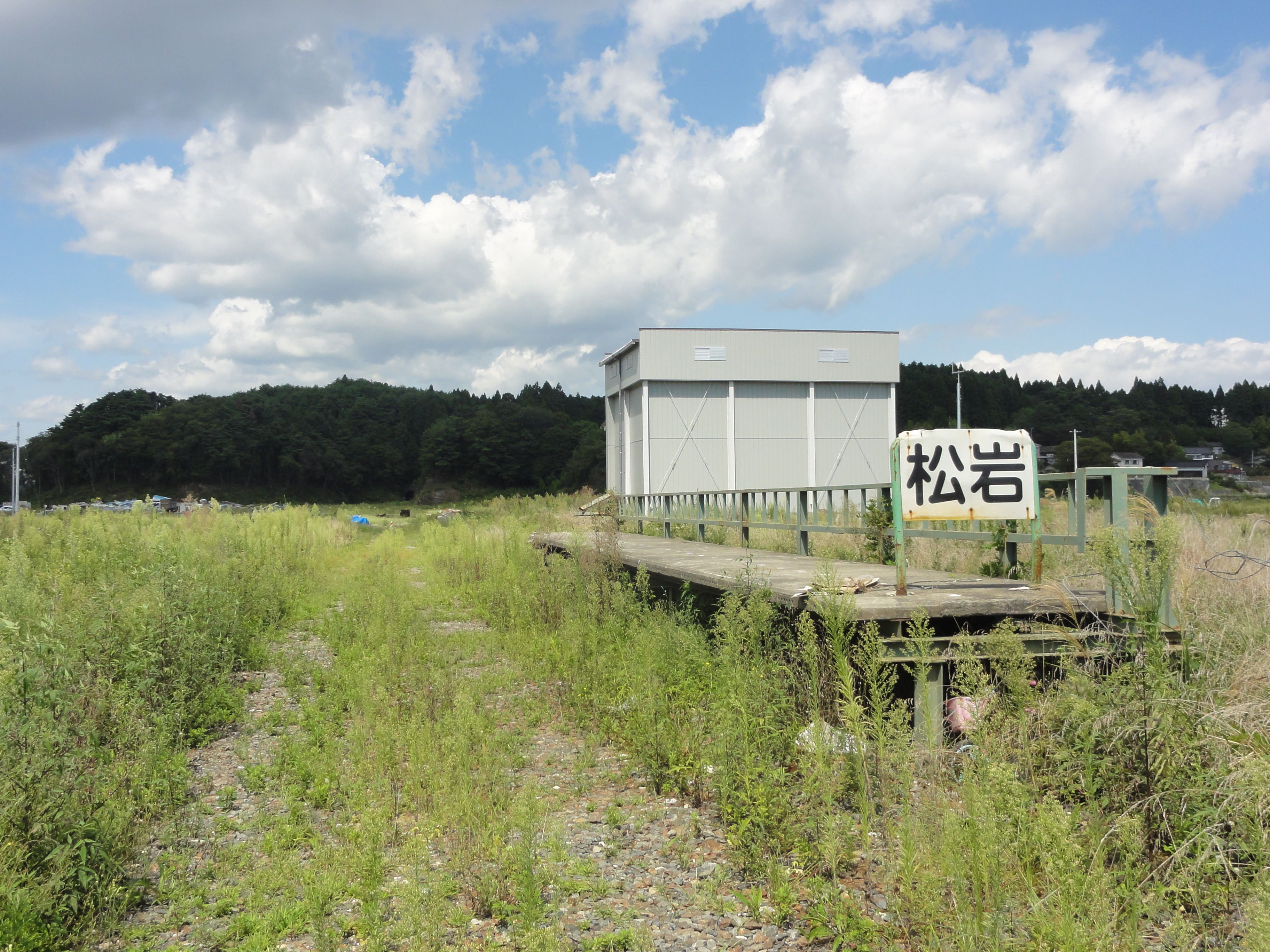 松岩駅跡地